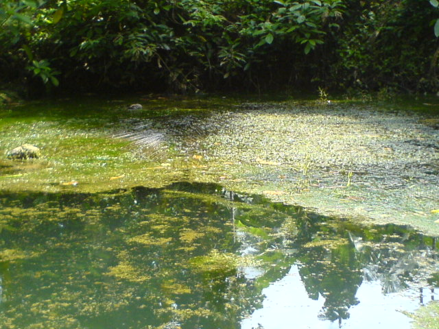 കുളത്തിലും,കിണറുകളിലും മറ്റു ജലാശയങ്ങളിലും കാണപ്പെടുന്ന പായൽ. കണ്ണൂര്‍ ജില്ലയില്‍ ഇതിനെ ചമ്മി എന്നു പറയുന്നു